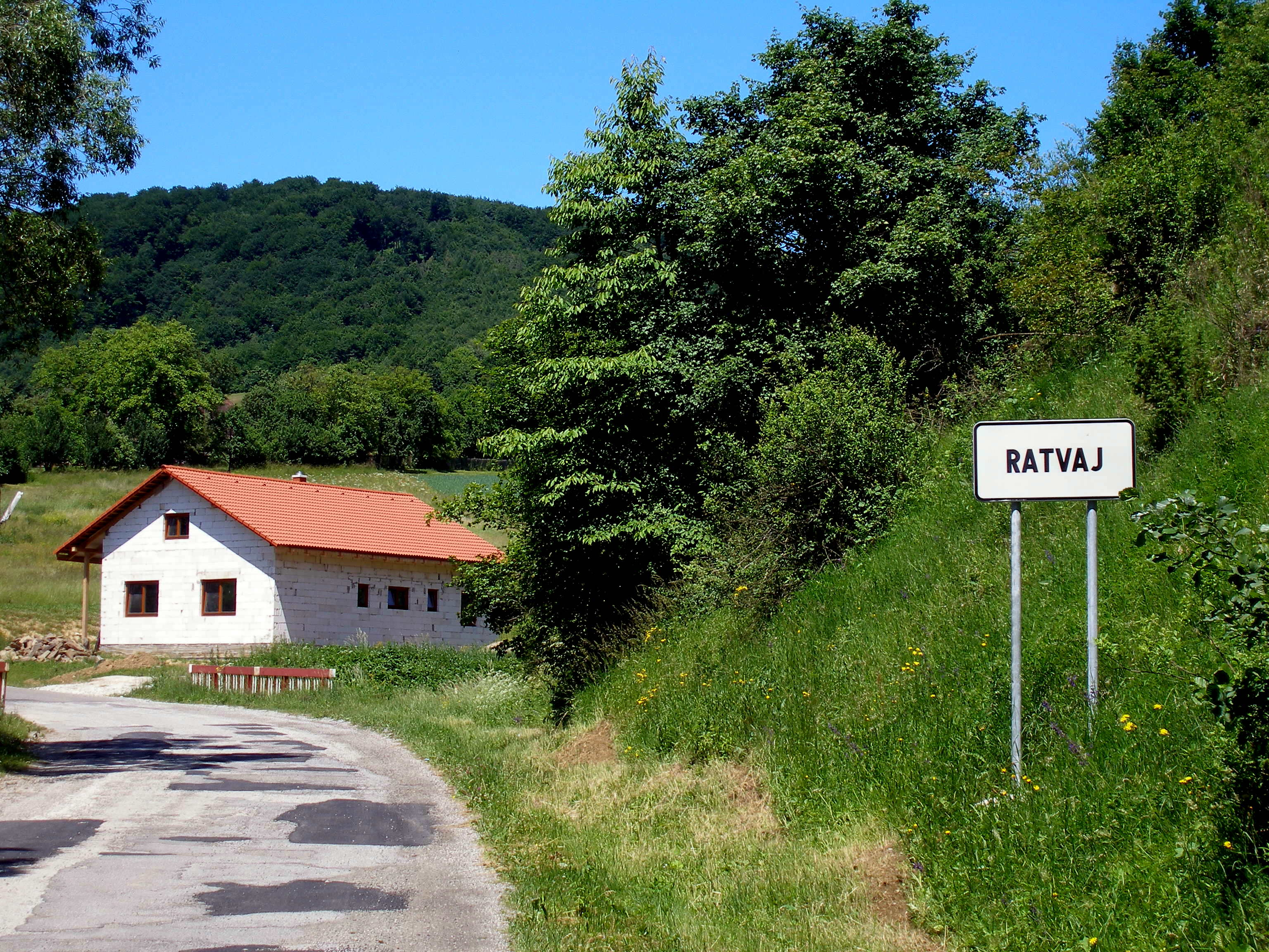 Obec Ratvaj okres Sabinov